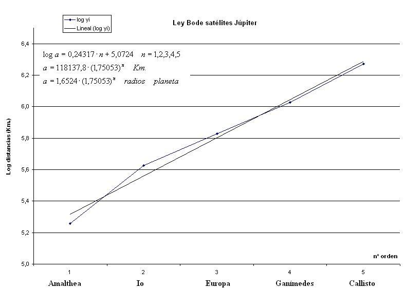 Origen de la imagen:[1]